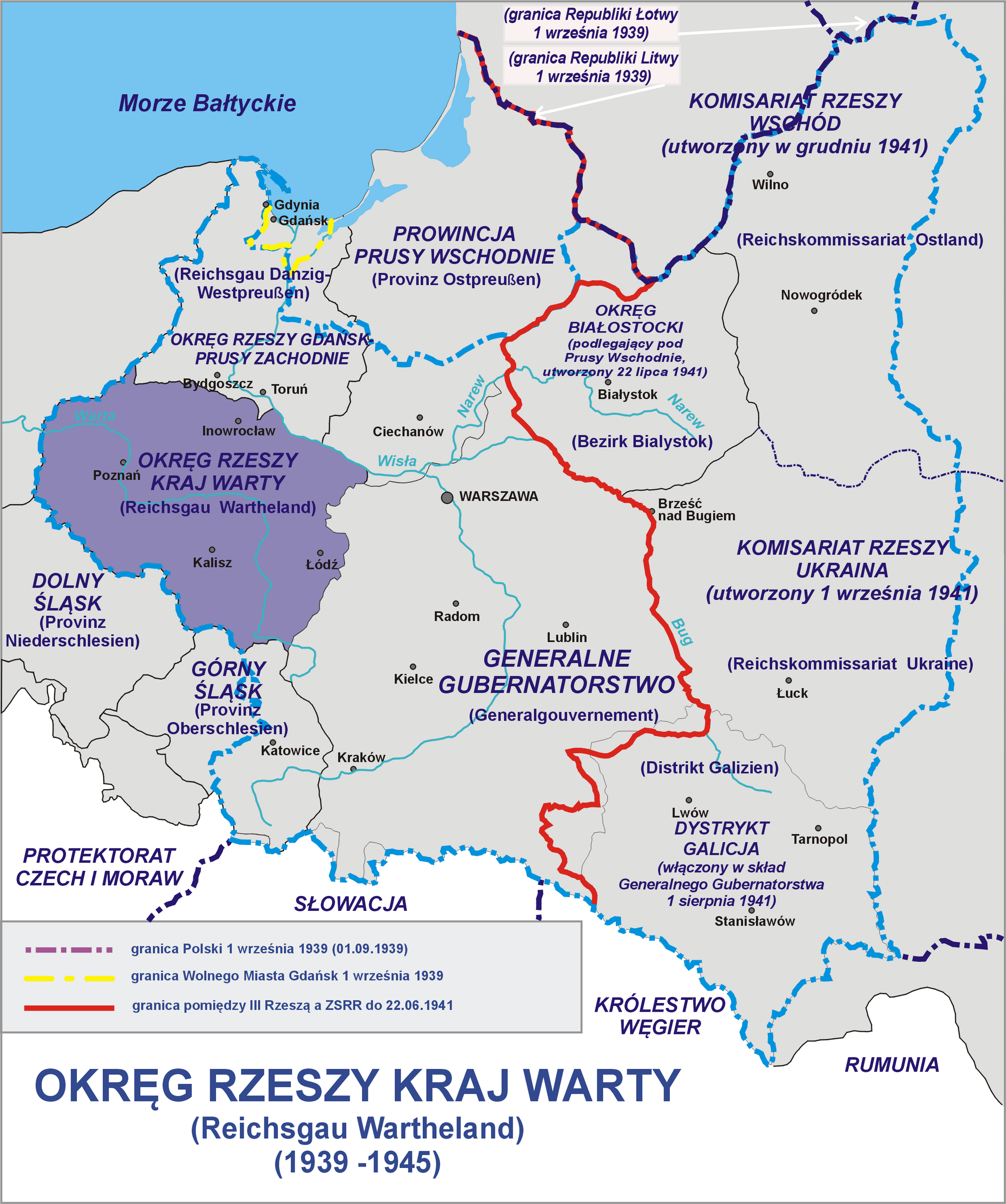 Okręg Rzeszy Kraj Warty (Reichsgau Wartheland) (1939 - 1945)